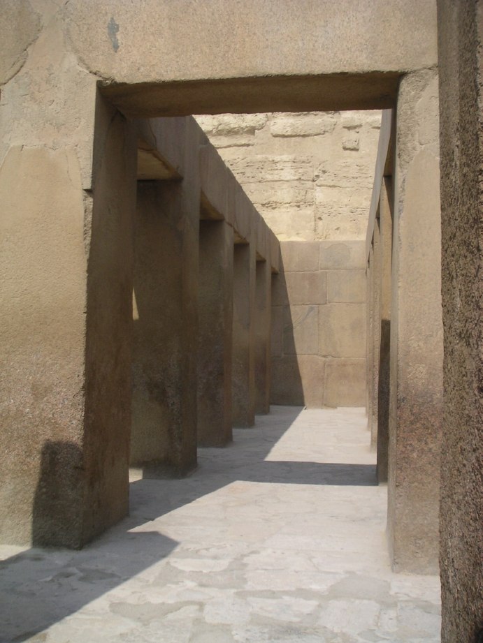 Vue sur la double rangée de piliers monolithique en granit rouge d'Assouan du temple d'accueil de Khéphren à Gizeh - IVe dynastie égyptienne